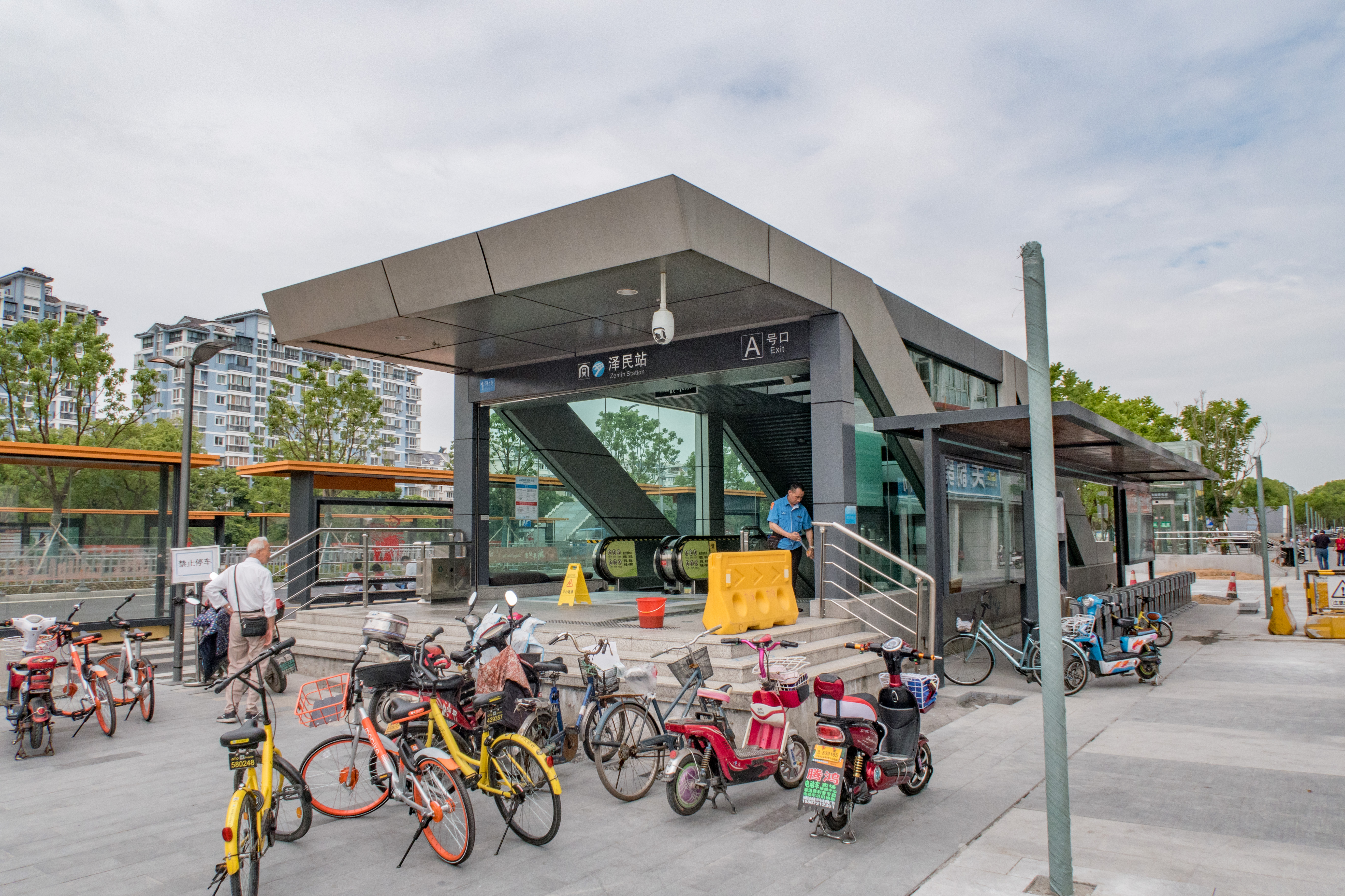 泽民站A出口